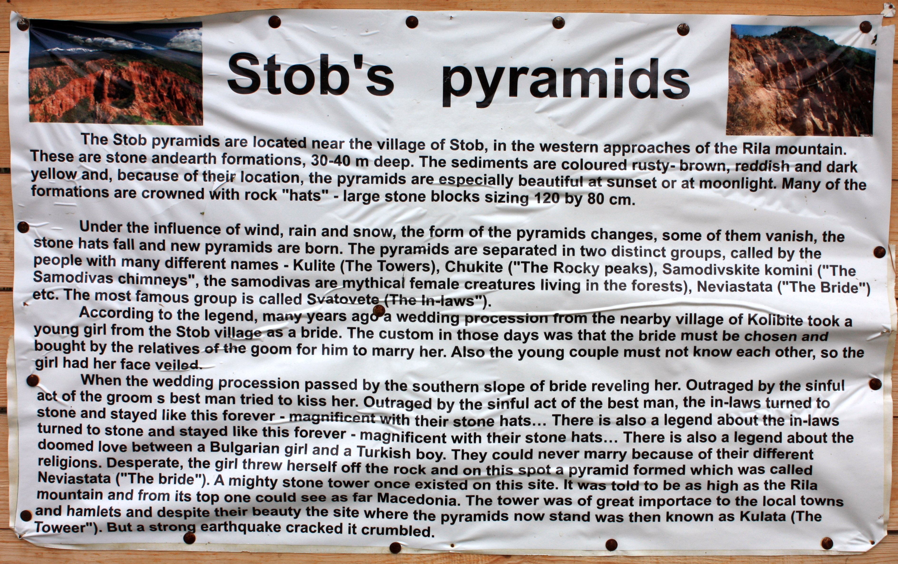 Touristeninformationstafel